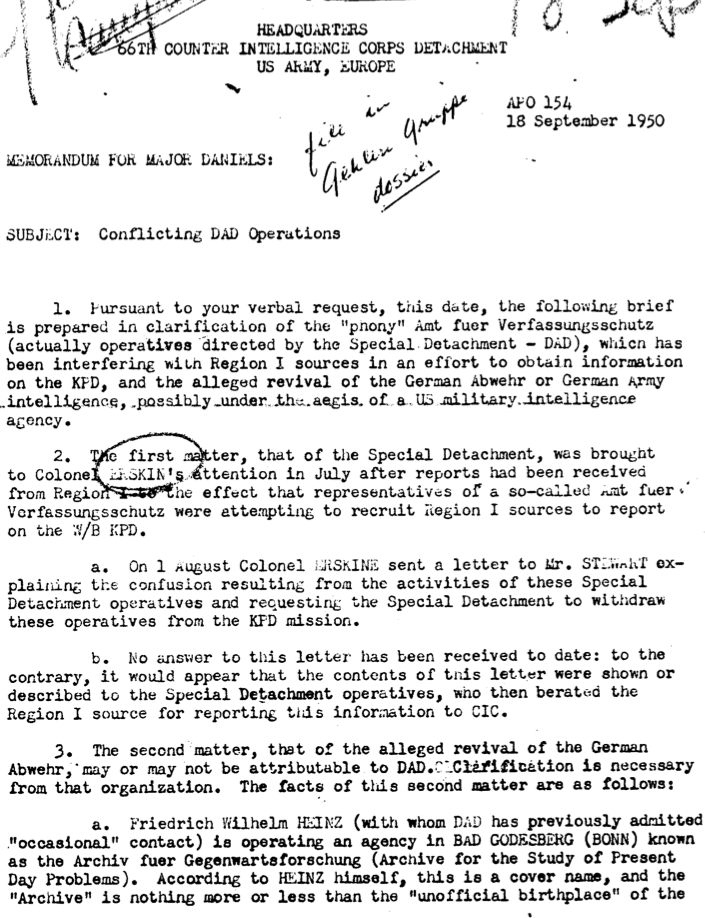 US-Army-Bericht von 1950 über den von den USA betriebenen Nachrichtendienst „Amt für Verfassungsschutz” und (einen der) BND-Vorläufer „Archiv für Gegenwartsforschung”